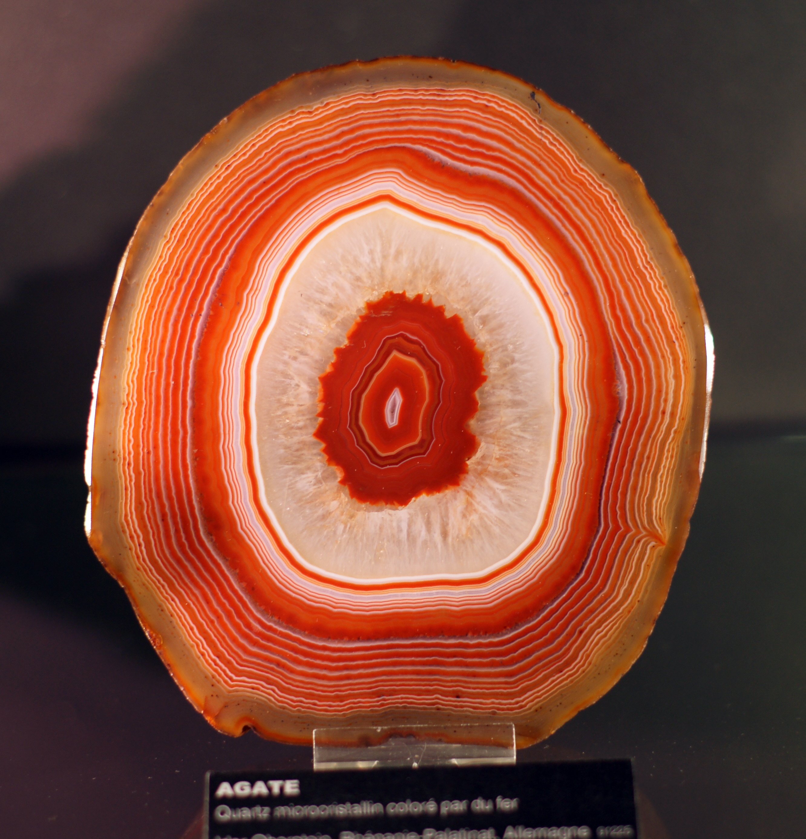 Losanna, Svizzera